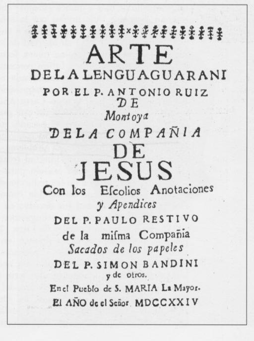 Cover of Arte de la Lengua Guarani